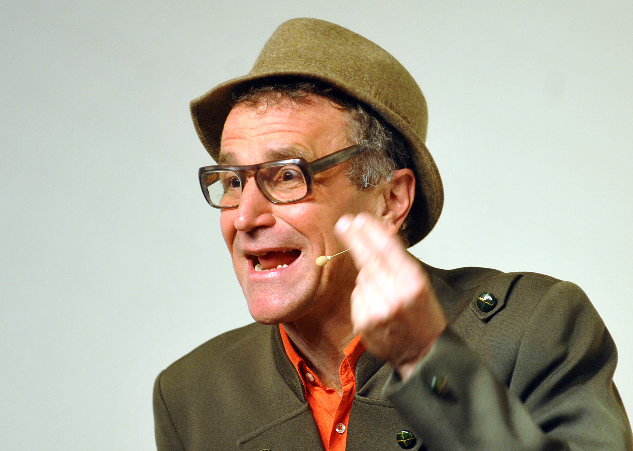 Büb Käzmann